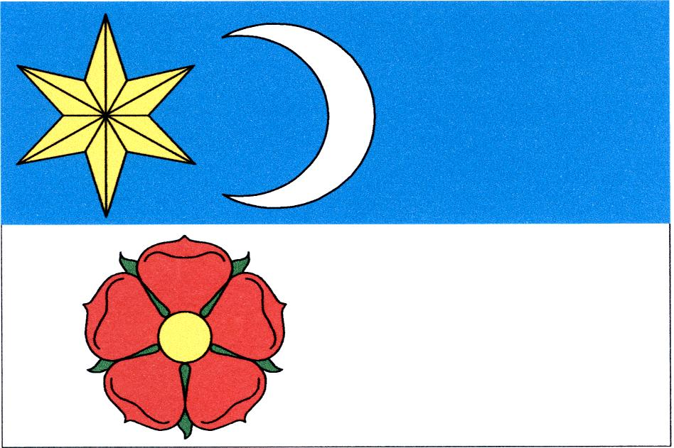 Vlajka obce Rožmitál na Šumavě